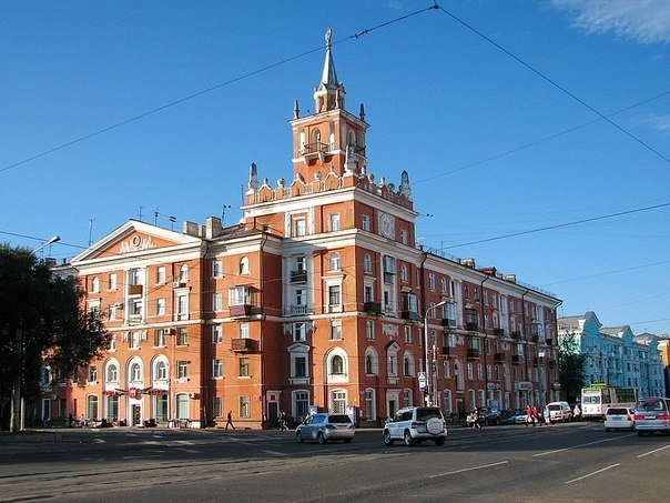 Неофициальный символ Комсомольска-на-Амуре считается «дом со шпилем».